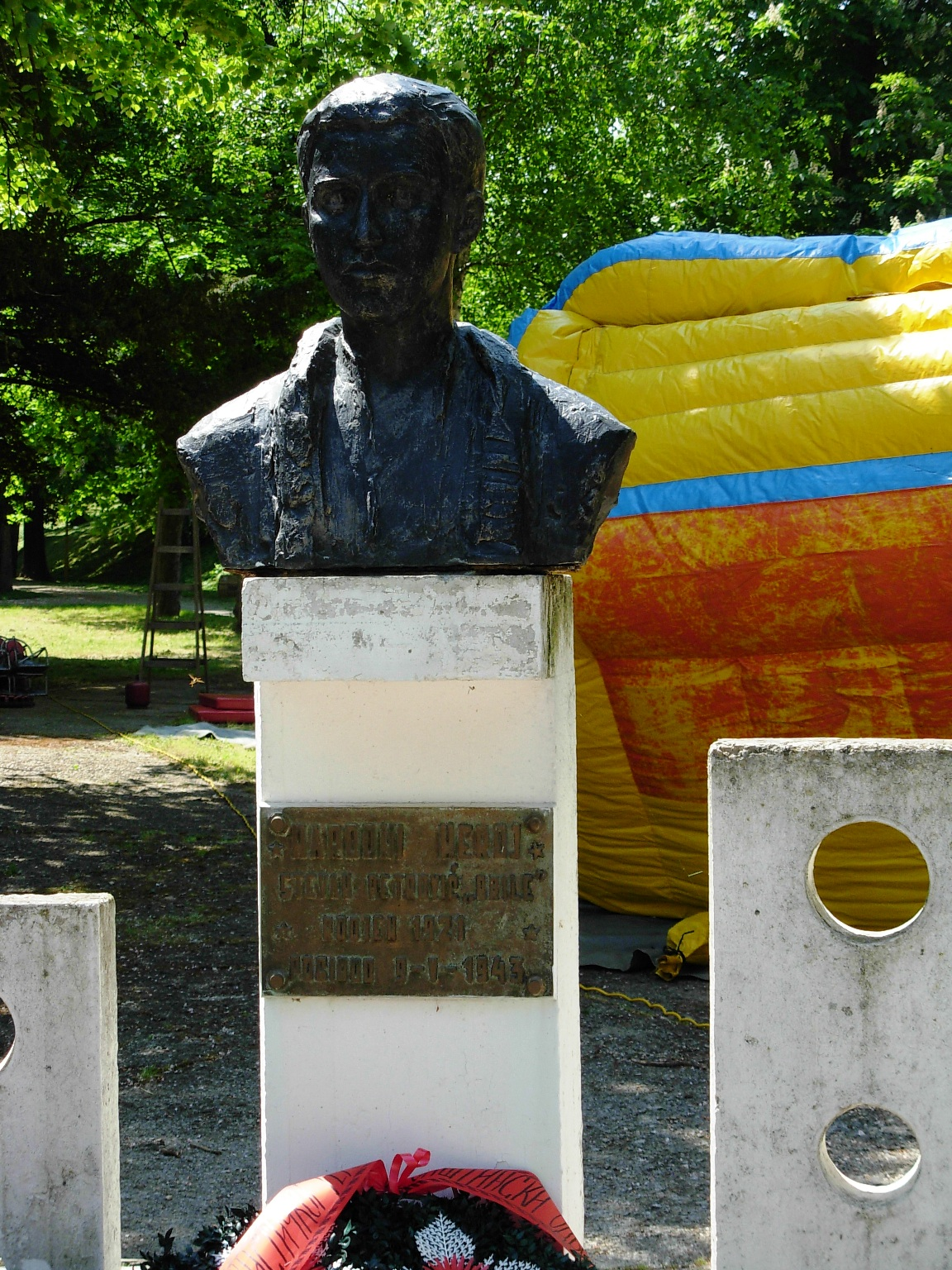 Bista Stevana Petrovića Brileta u Beočinu.